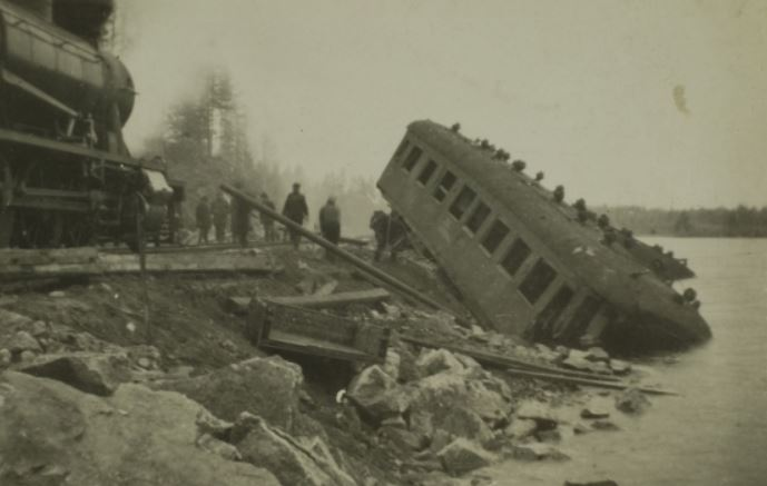 Ojajärven junaonnettomuus 1.9.1928